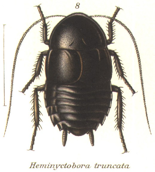 Heminyctobora truncata (=Nyctibora truncata)